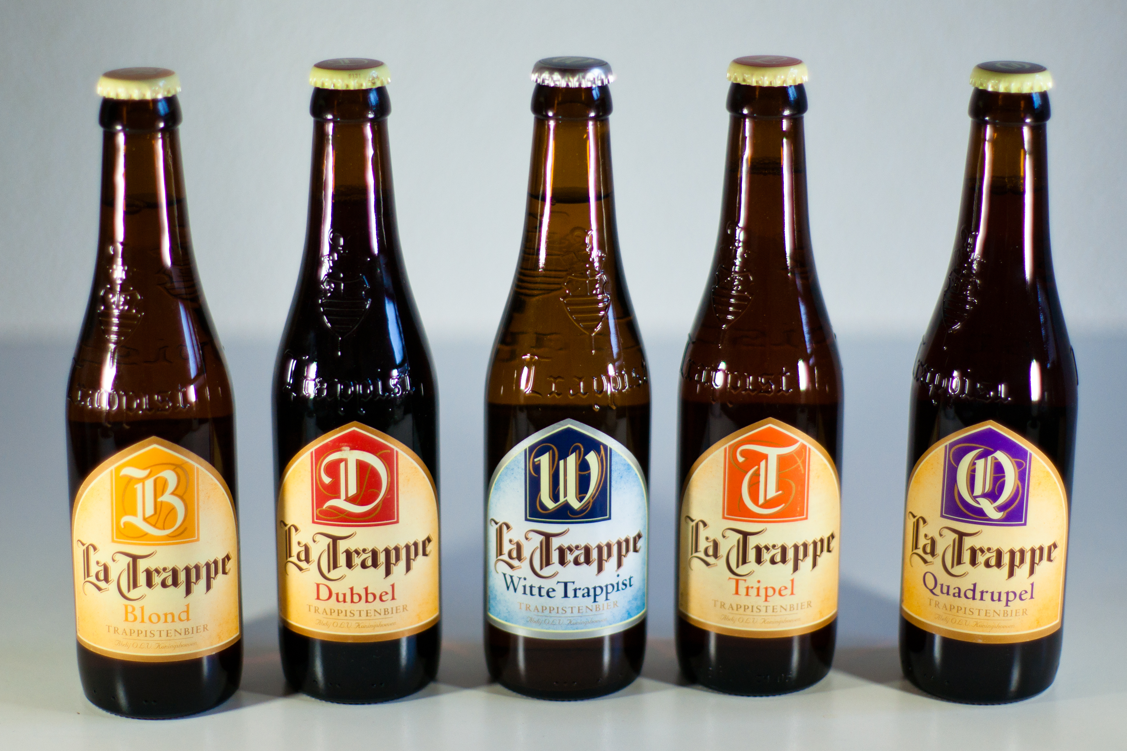 Bière trappiste La Trappe, 5 bouteilles.